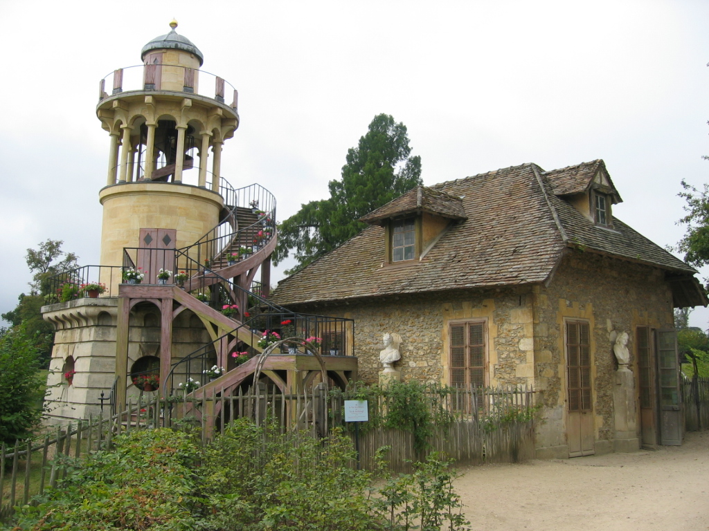 Tour de Malborough et Laiterie de propreté du Hameau de la Reine - Versailles